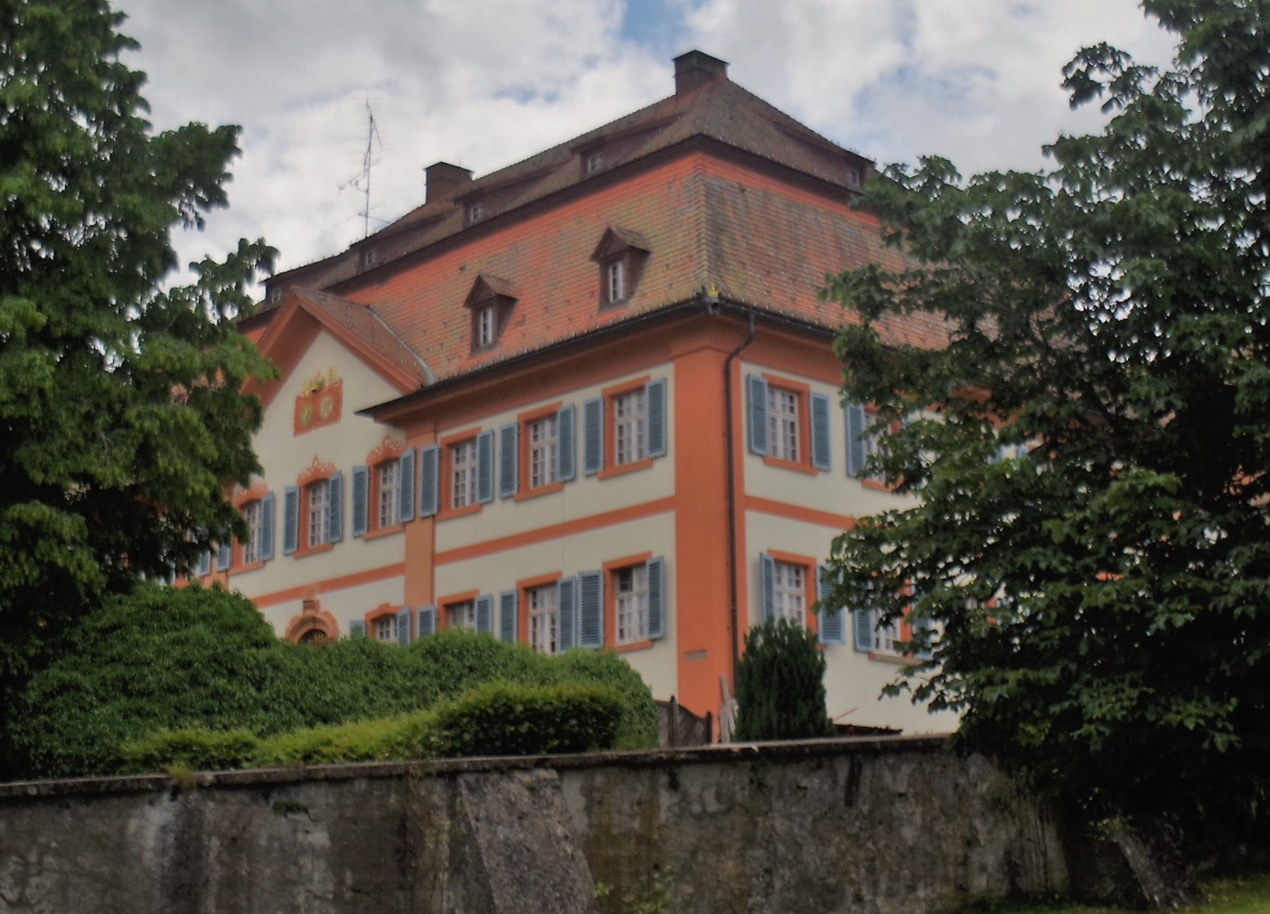 Propstei Grafenhausen